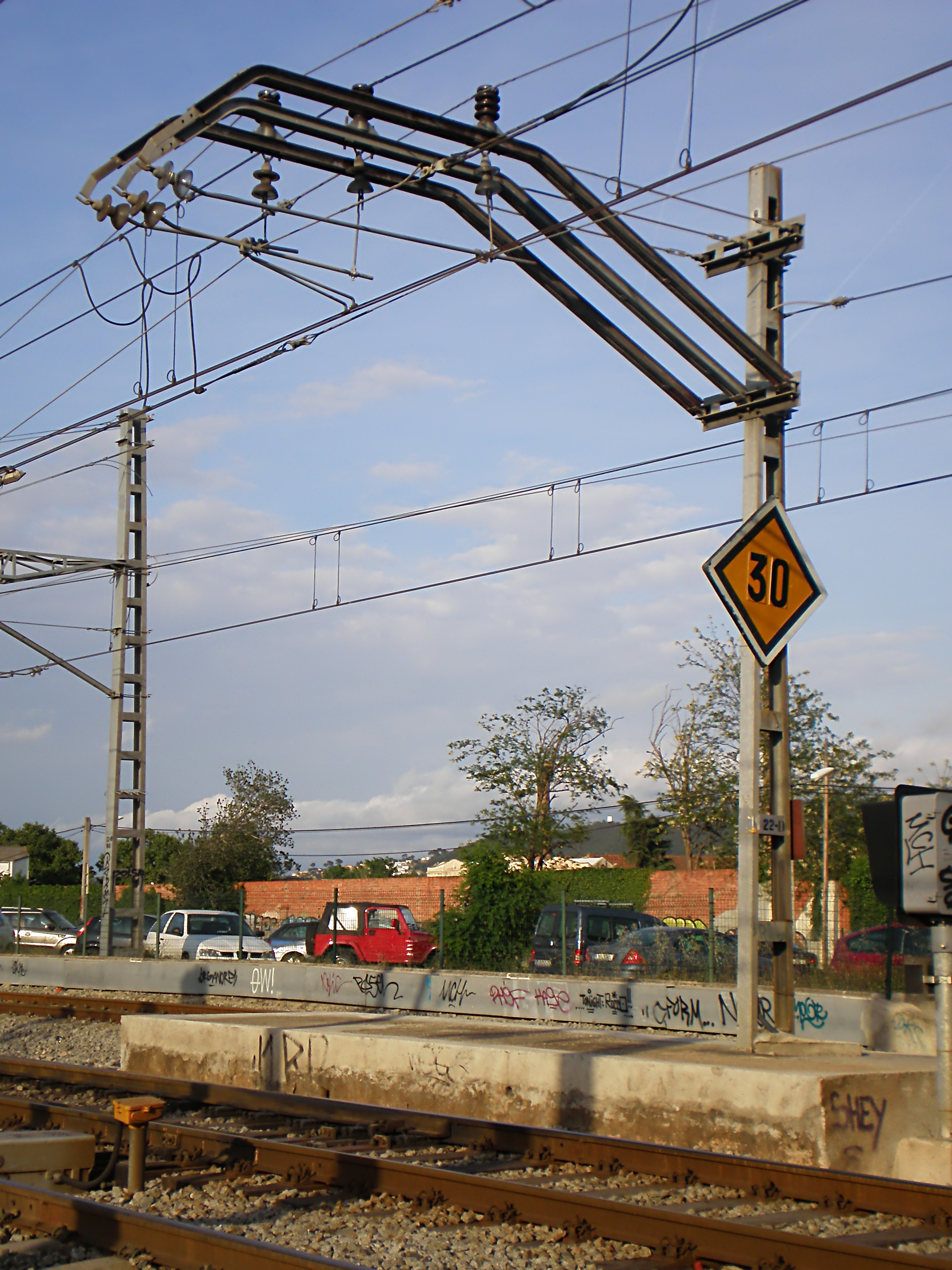 Señal provisional de limitación de velocidad en la estación de Mollet - Sant Fost (Mollet del Vallès, comarca del Vallès Oriental, provincia de Barcelona, Catalunya). Las diferentes velocidades corresponden a los tipos de tren de Renfe Operadora, de arriba a abajo: Tipo "Normal" o "N", tipo "A" y tipo "B".